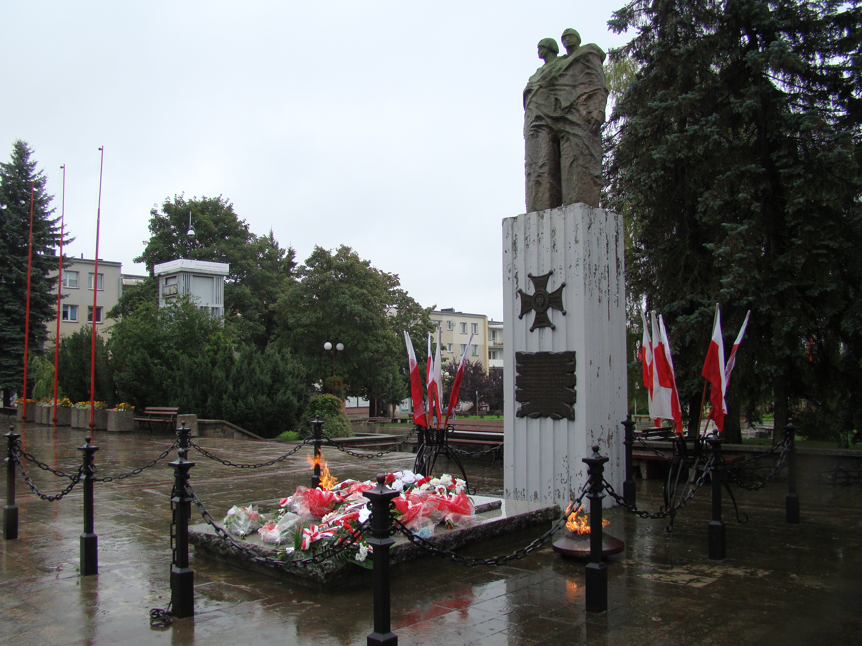 Pomnik Nieznanego Żołnierza w Świdniku. 1 września 2010 roku